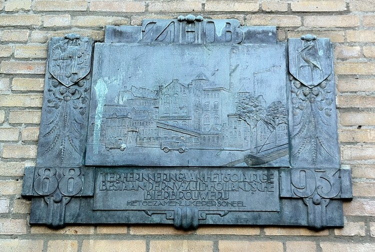 ZHB bord voor 50-jarig bestaan